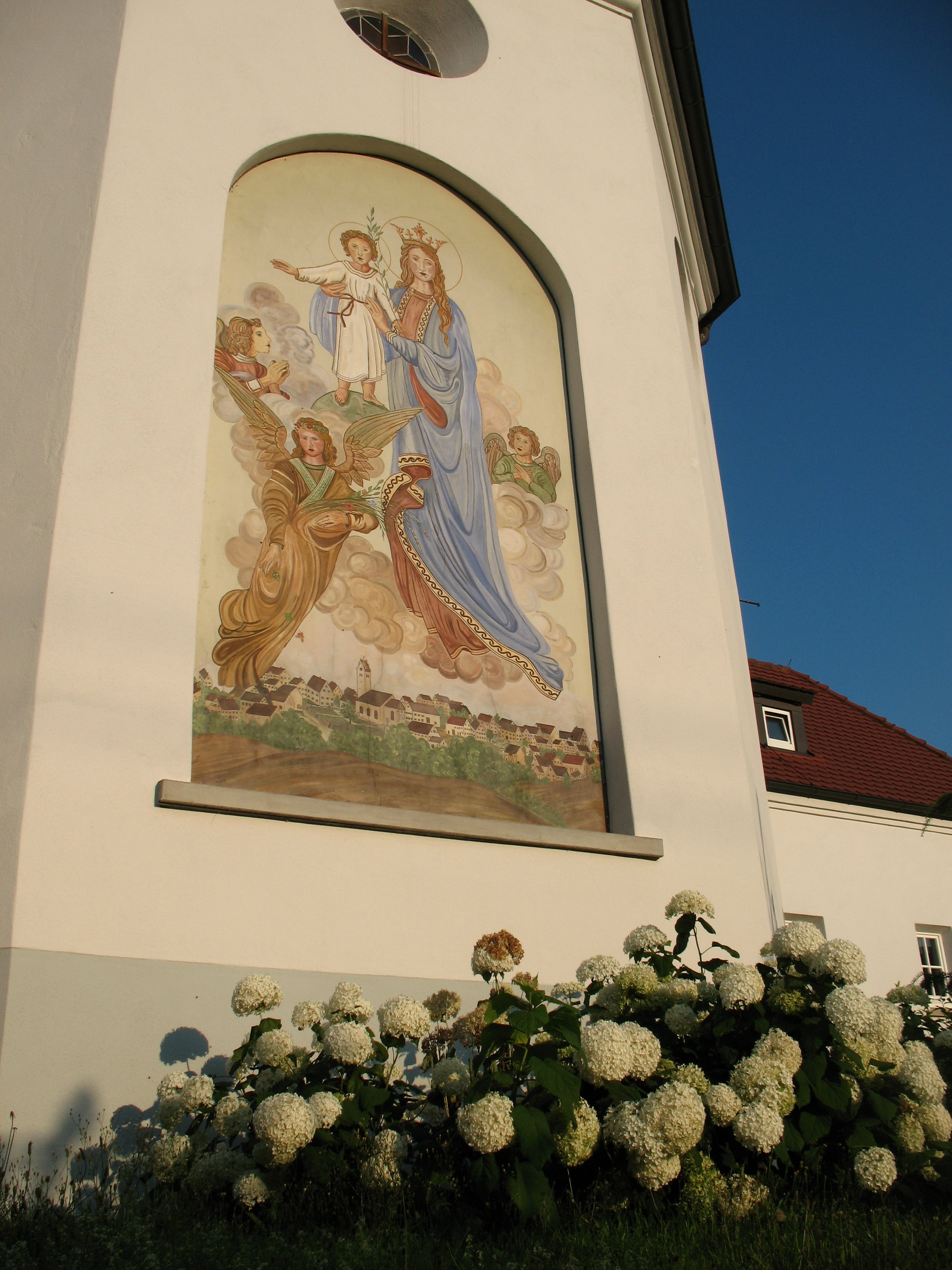 Außengemälde an der Ostseite des Kirchenschiffes.